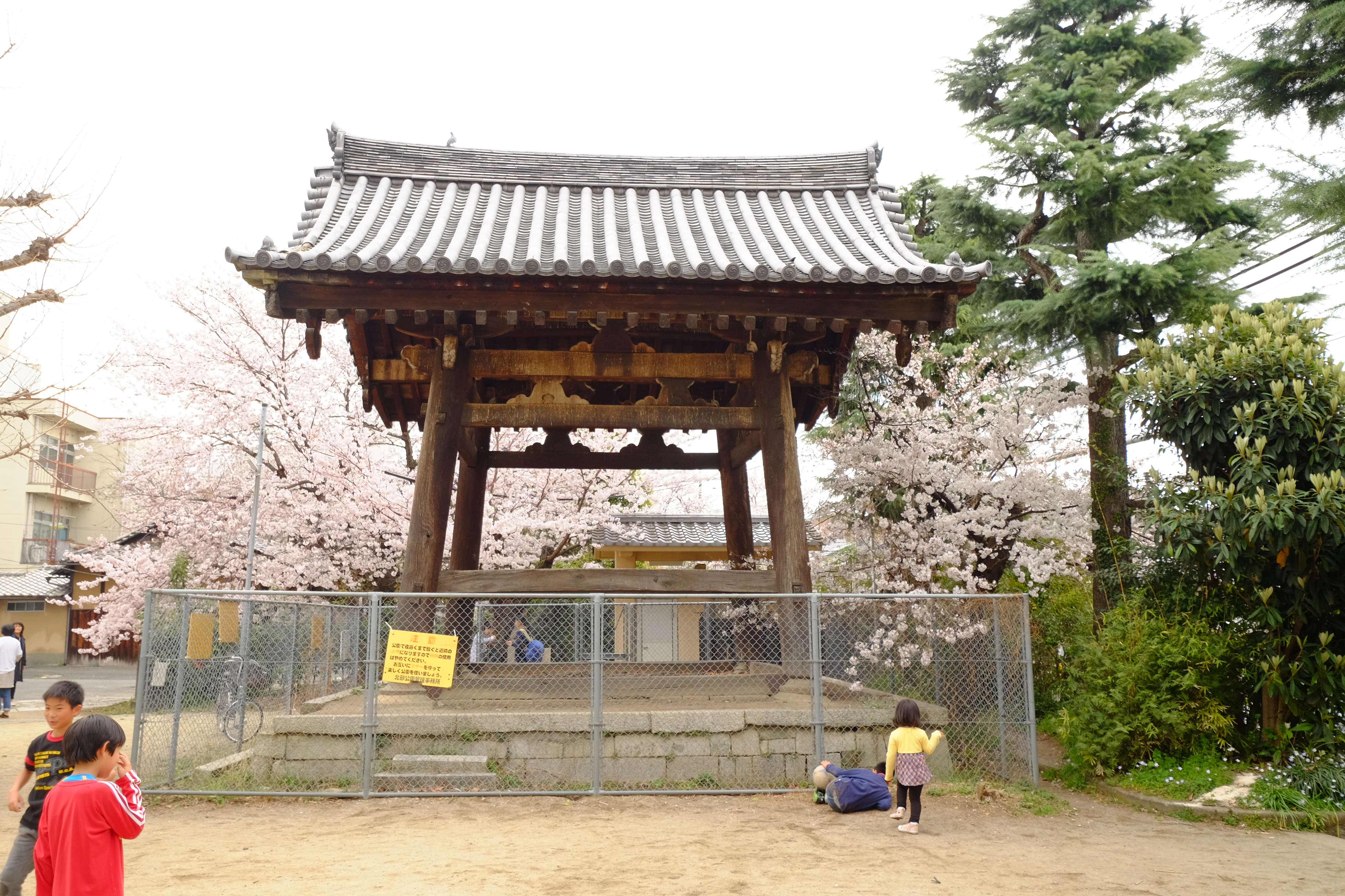 立本寺 鐘楼の西面。 Fujifilm X-T1